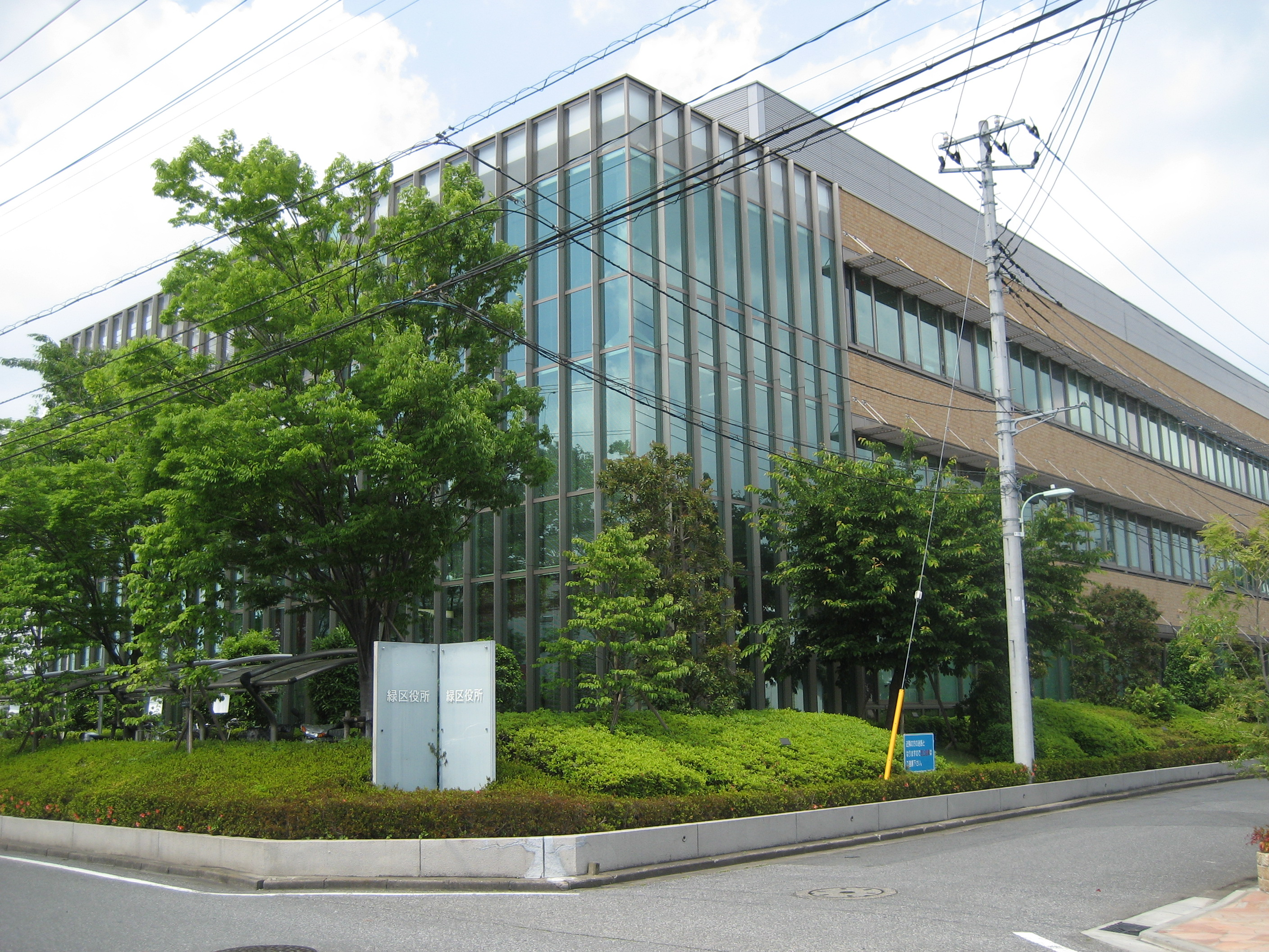 さいたま市緑区役所庁舎